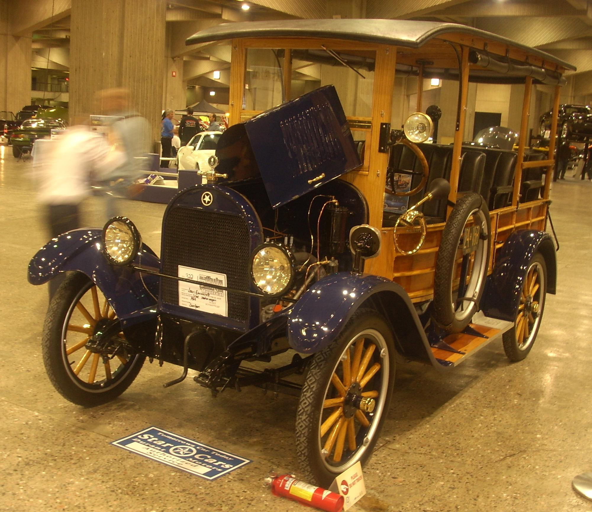 1923 Star Four Model C Station Wagon photographed at Auto classique Montréal 2008.